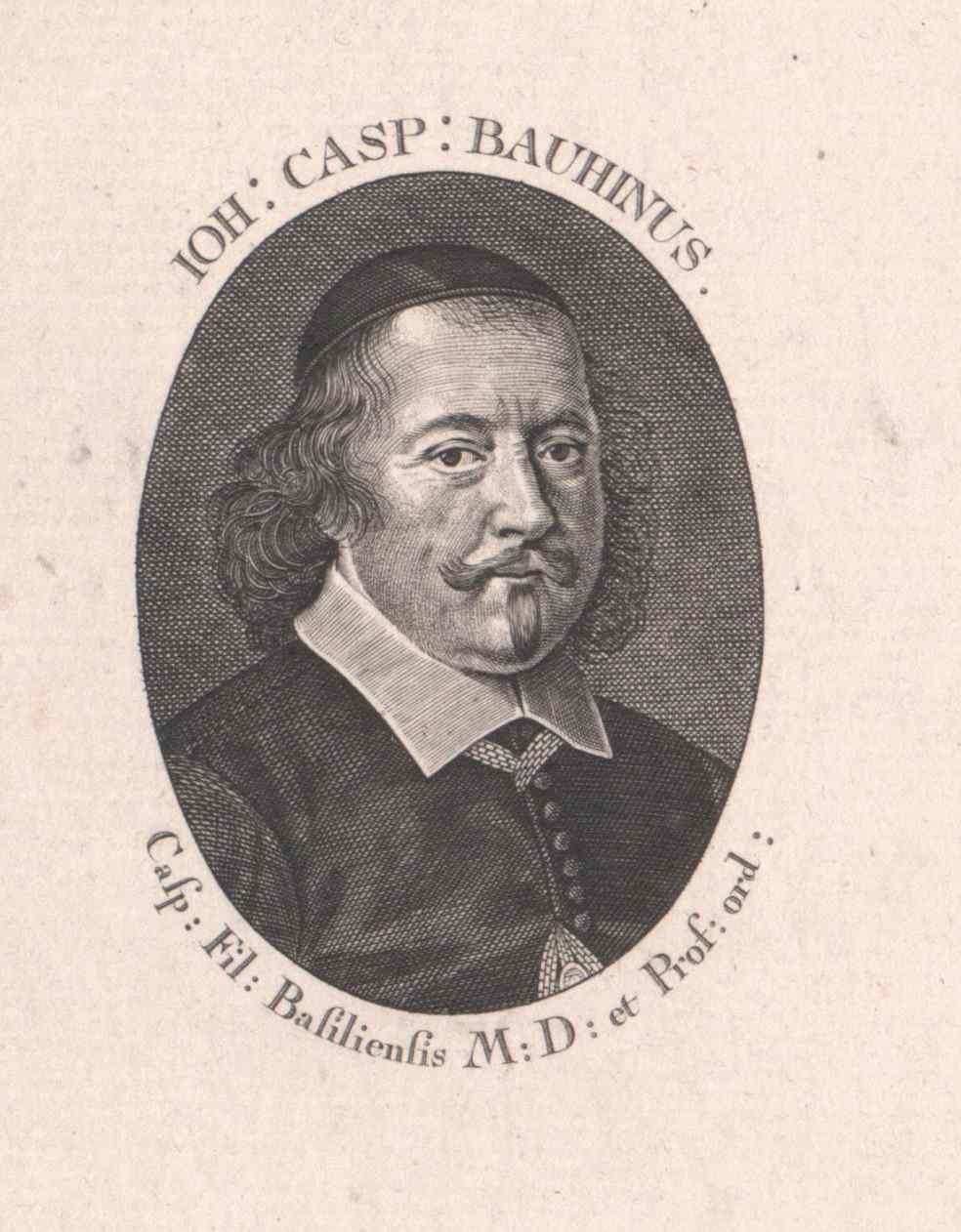 Johann Caspar Bauhin (1606–1685)